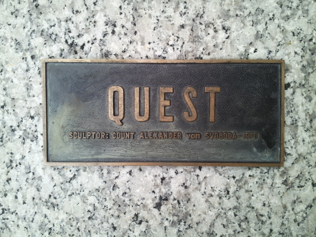 The Quest plaque, Portland (2013)